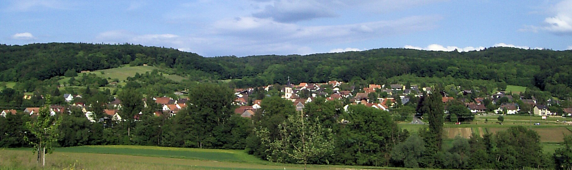 Blick aus Richtung Westen auf Wittlingen, Baden-Württemberg, Deutschland